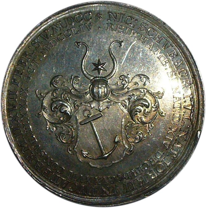 Die Vorderseite des Bürgermeisterpfennig zu Ehren Nicolaus Schuback († 28. Juli 1783). Siehe Otto Christian Gaedechens, Begräbnismünze Nr. 7, Verein für Hamburgische Geschichte (Hrsg.): Hamburgische Münzen und Medaillen, Verlag Johann August Meissner, Hamburg, 1850, S. 57, (online)